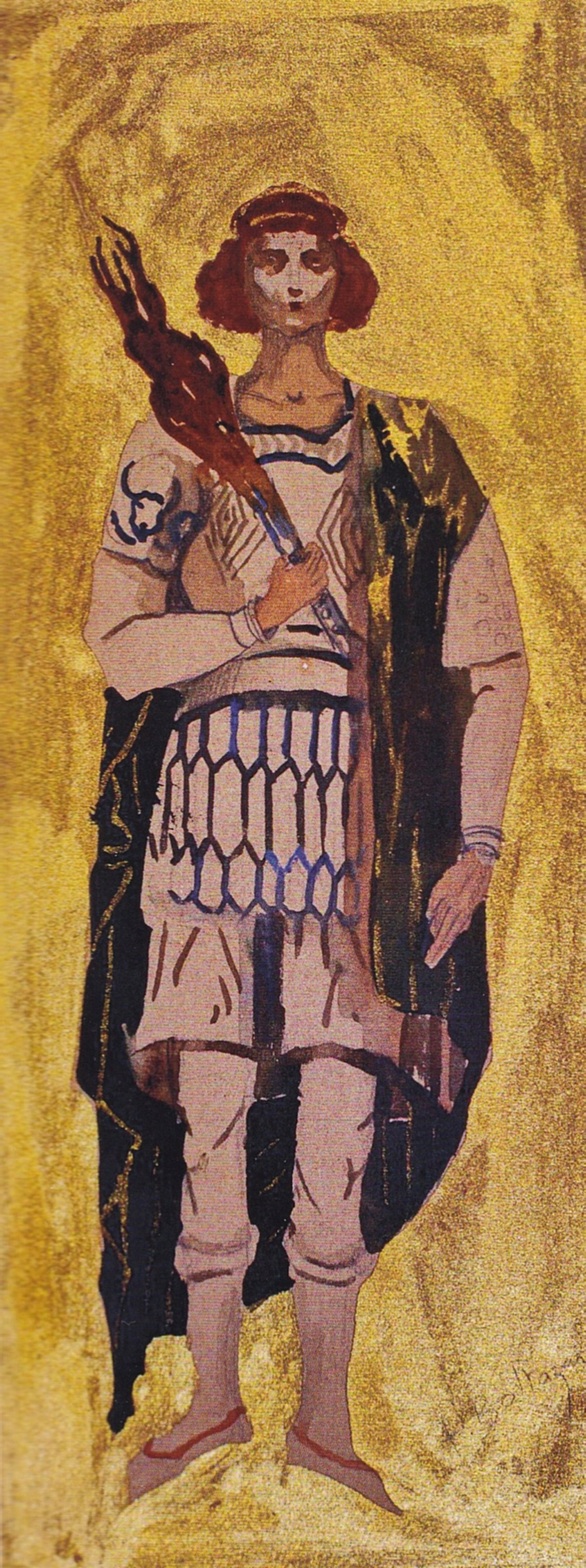 Fat Frumos cu torta